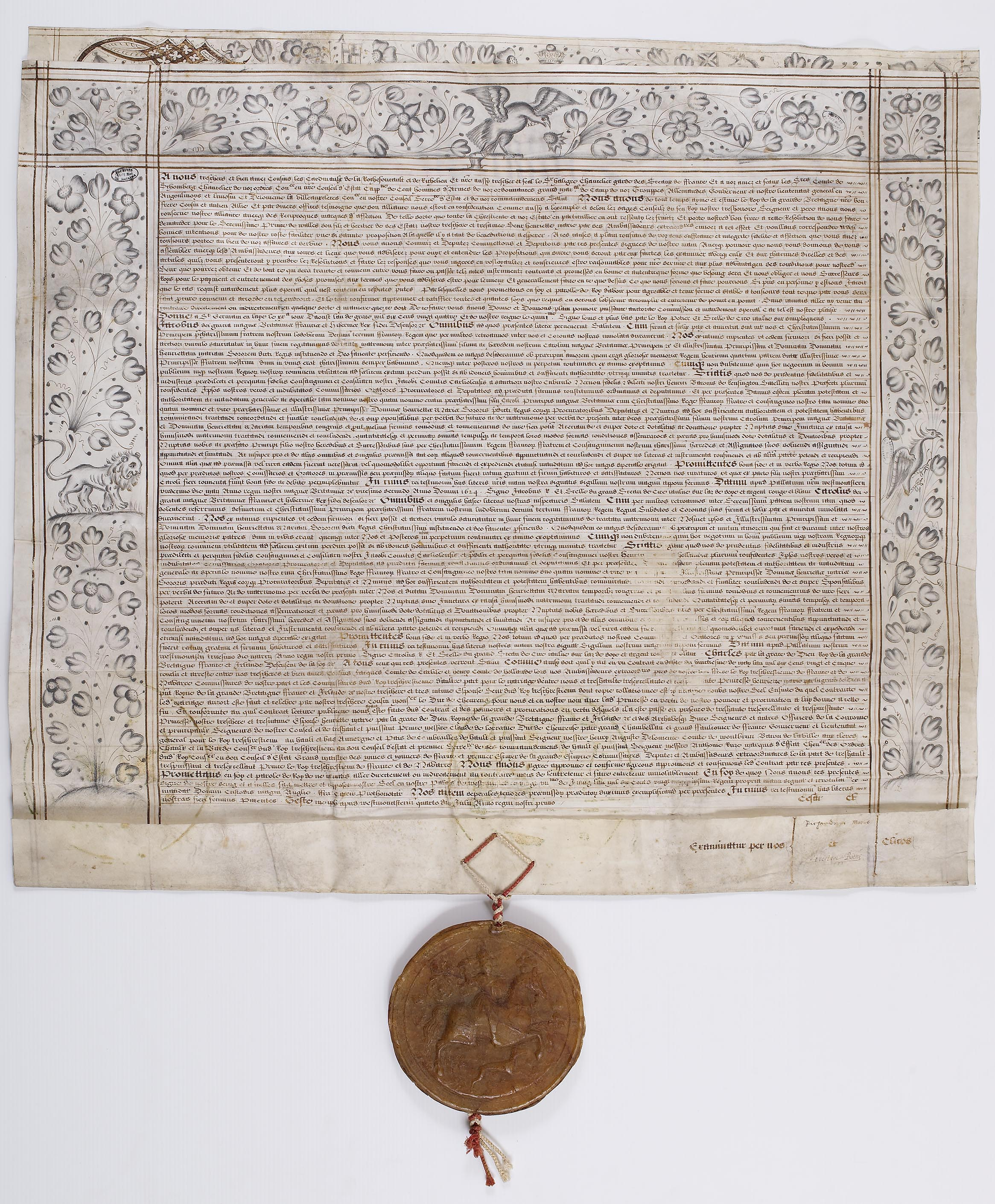 Deuxième page d'une charte de Charles Ier relative à son mariage avec Henriette Marie de France, 4 juillet 1625